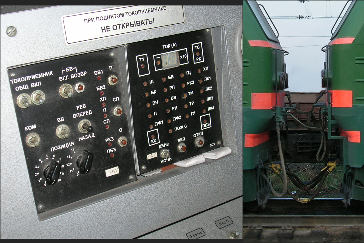 Пульт аварийного управления ПУА, панель синхронного управления ПСУ и межсекционное соединение электровоза ВЛ10К Челябинского завода